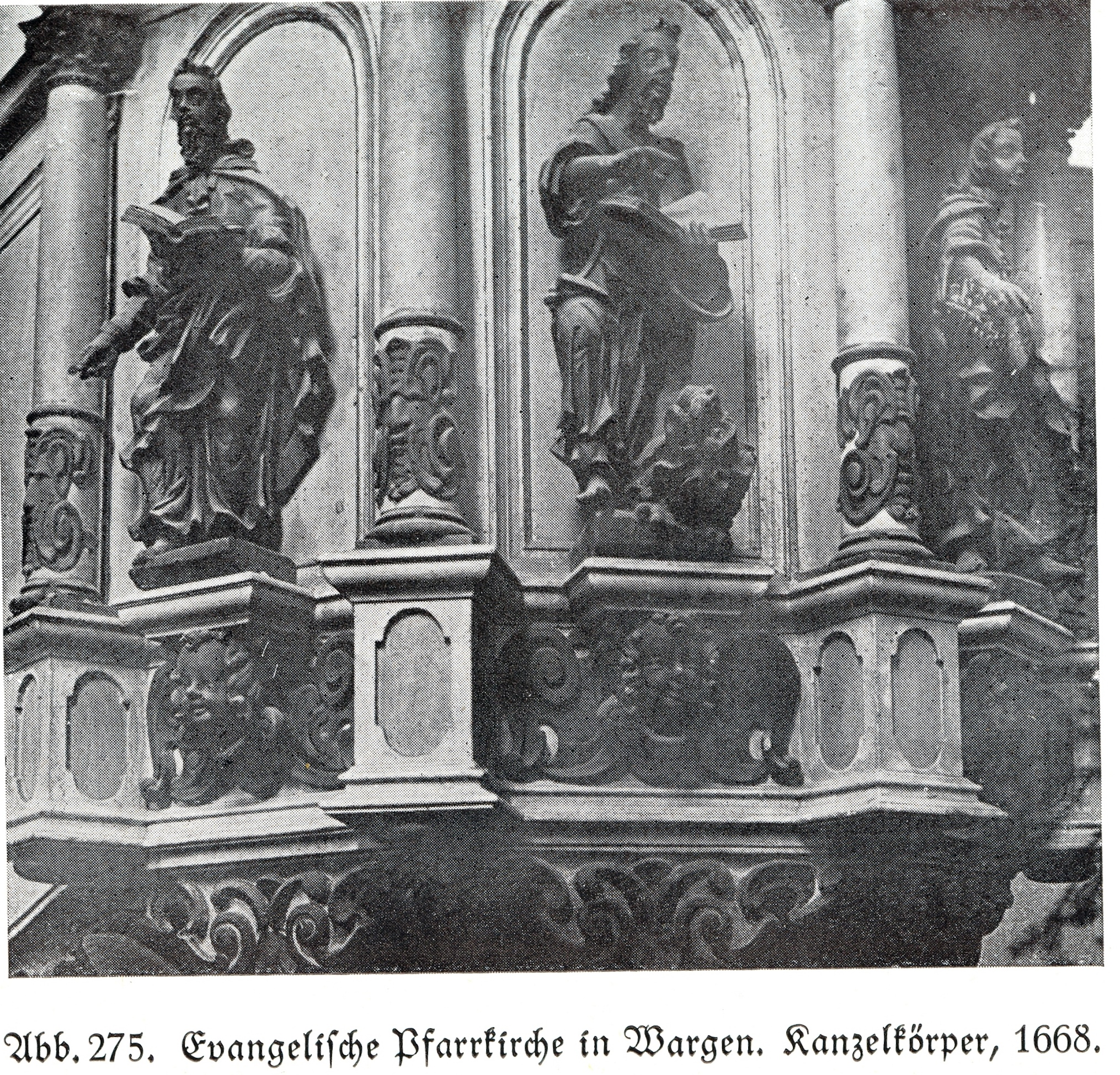 Wargen, Evangelische Pfarrkirche, Kanzelkörper, 1668, Bildhauer Joh. Pfeffer (zugeschrieben)